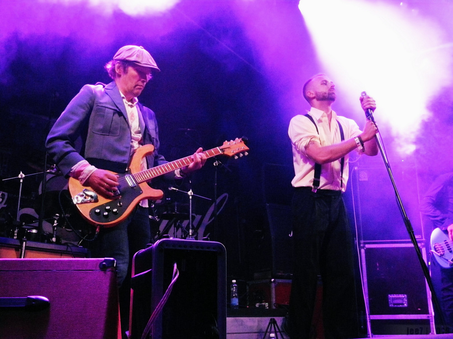 Rainer Jancis ja Robin Juhkental ansambliga Metro Luminal esinemas muusikafestivalil Hard Rock Laager 2019.